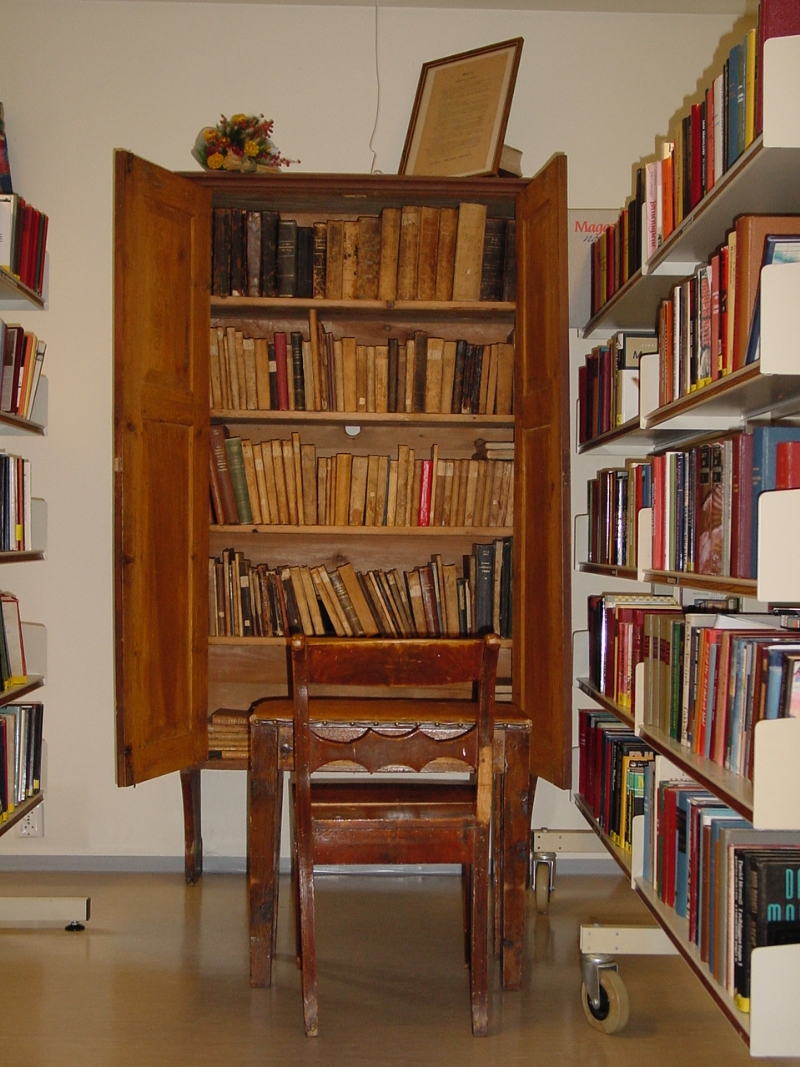 Eide bibliotek, 1875